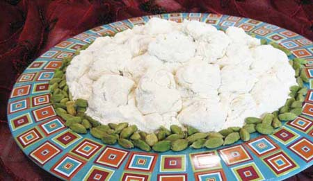 حلوى من السما محاطة بالهيل في صحن زجاجي.